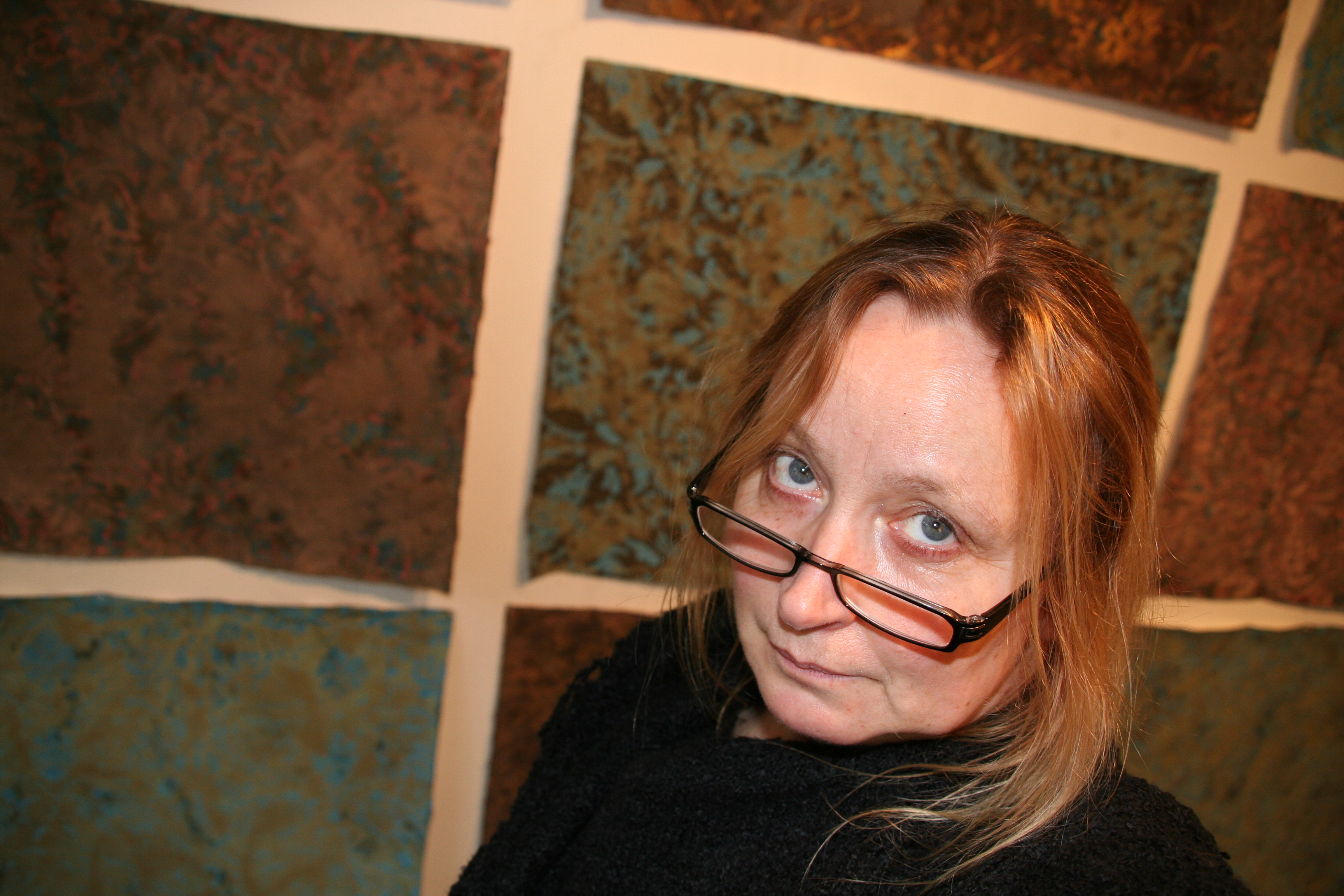 Frá sýningunni Open Studio í París